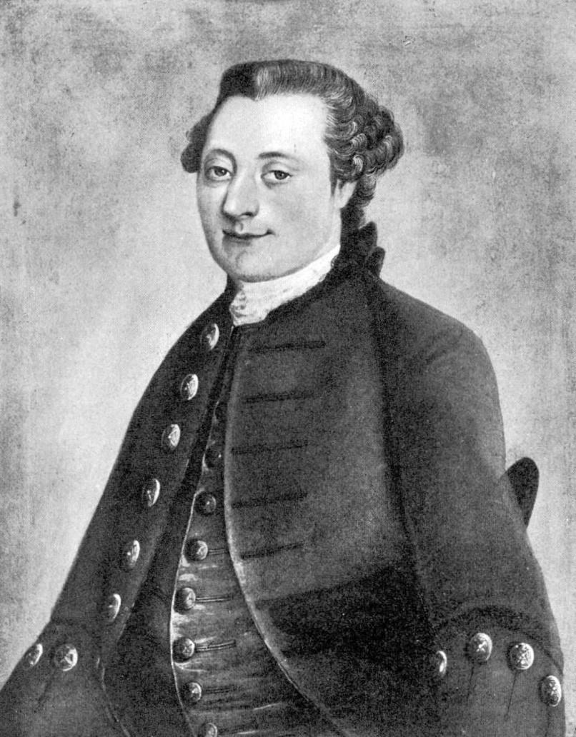 Peter Petersson Ekman (1740-1807).